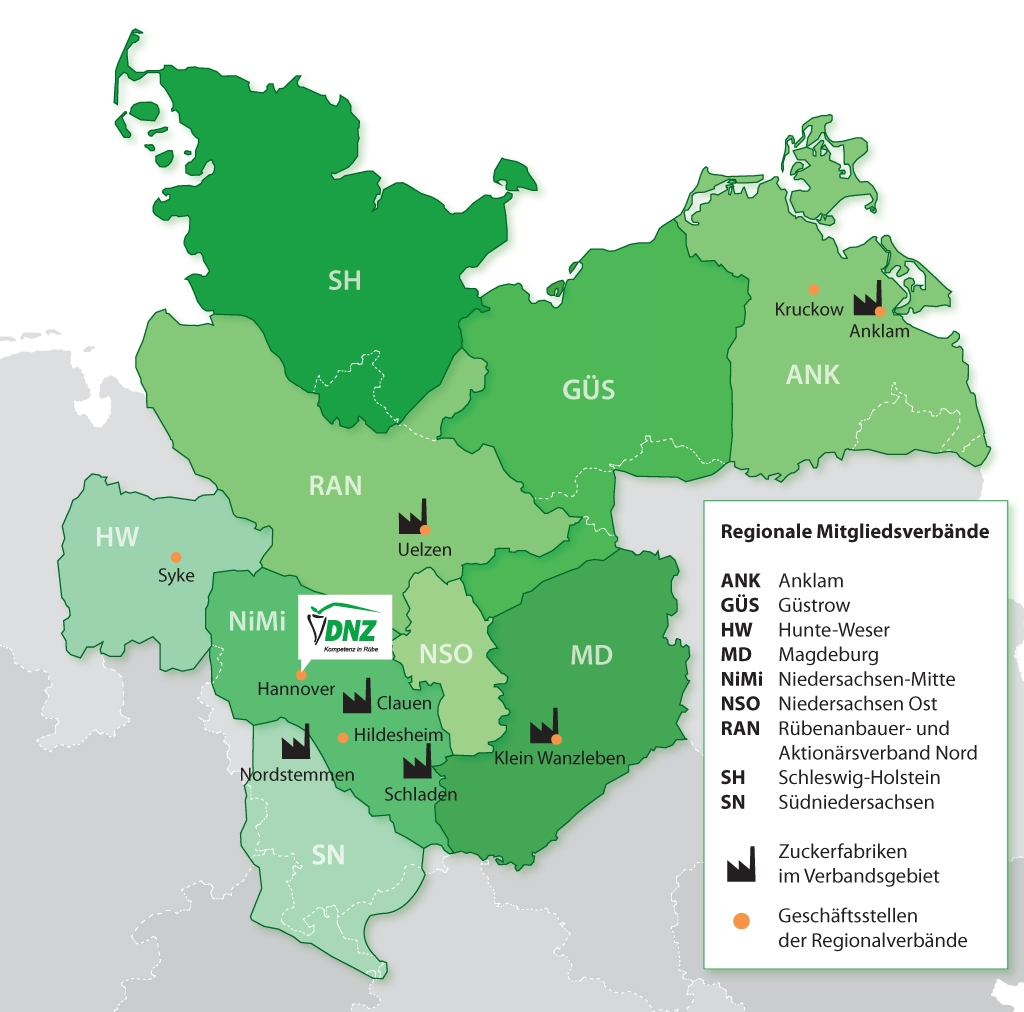 DNZ-Verbandsgebiet